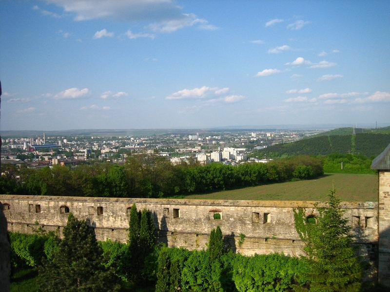 Zelfgemaakte afbeelding, Iasi is op de achtergrond te zien. De foto is gemaakt vanuit een klooster op 1 van de heuvels die iasi omringen.